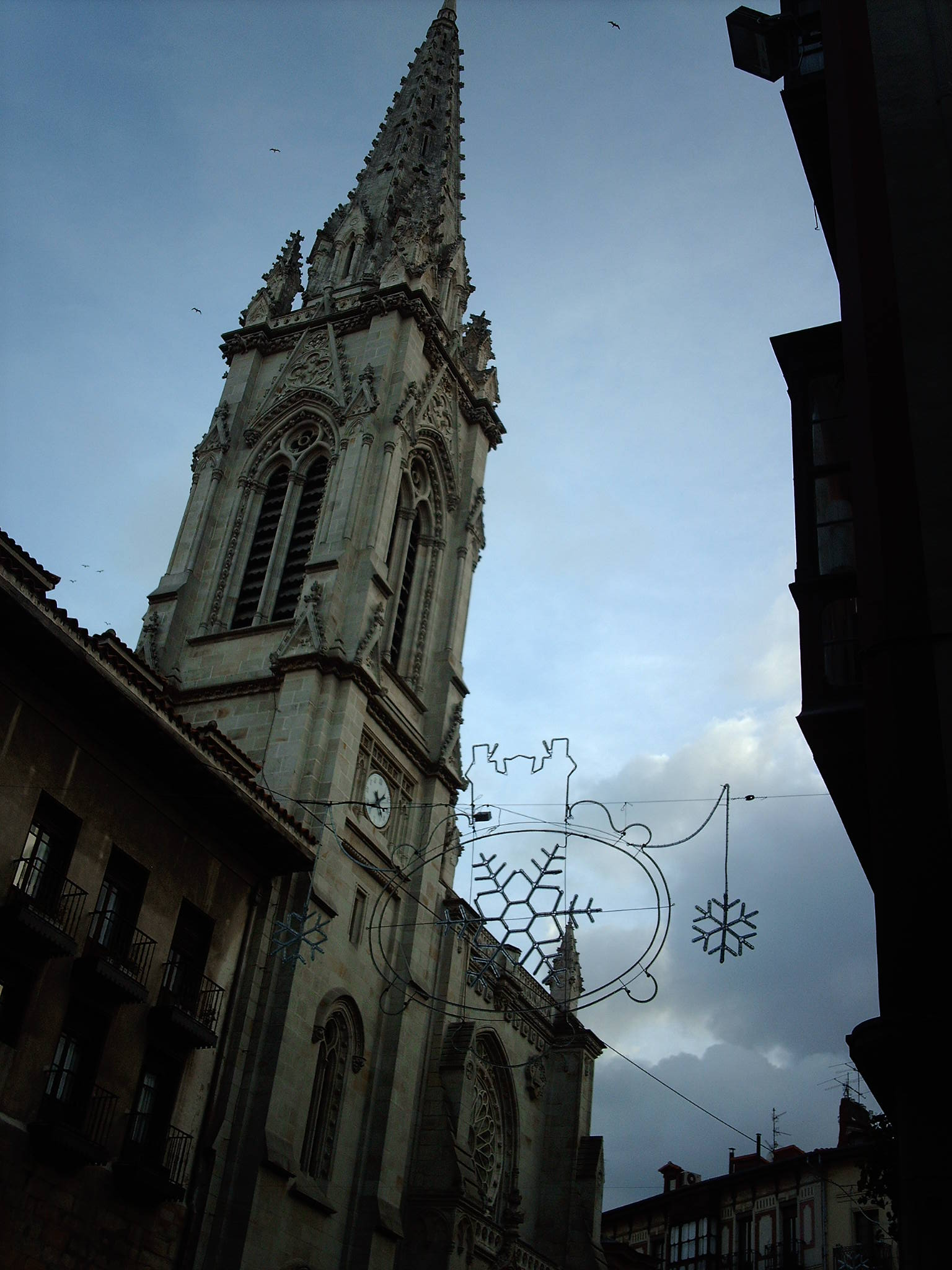 Catedral de Santiago, creo, en Bilbao.